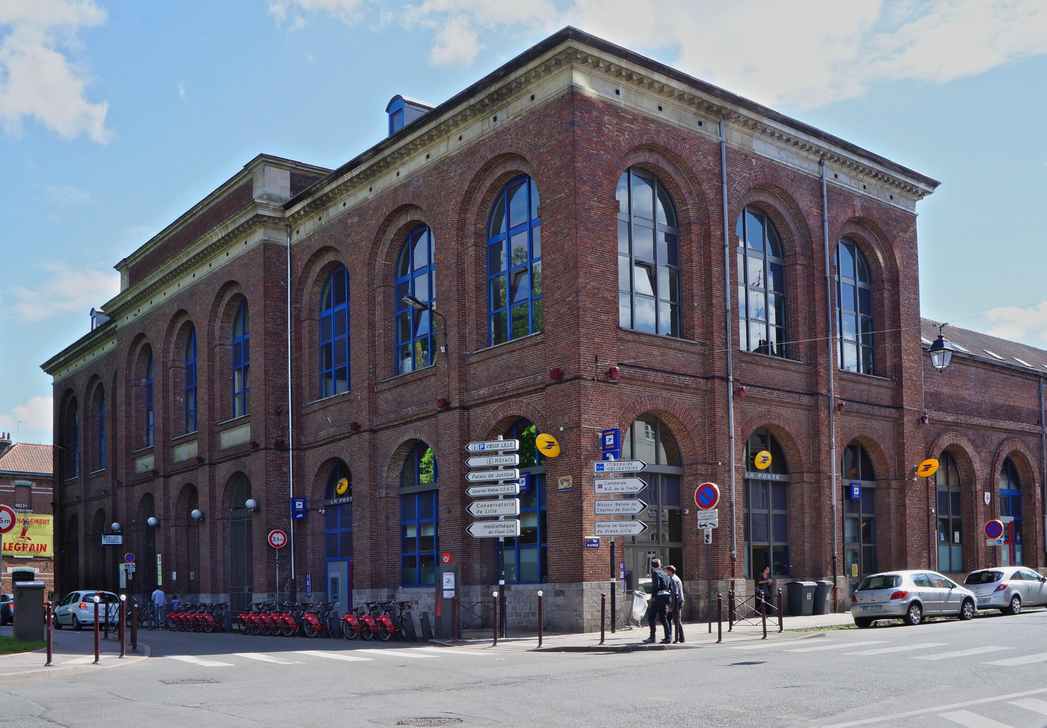 La halle aux sucres (1848) Lille Nord (département français)